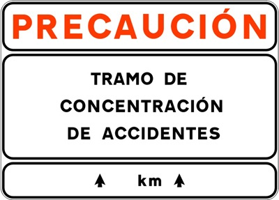 Señal que muestra el comienzo de un tramo de concentración de accidentes.